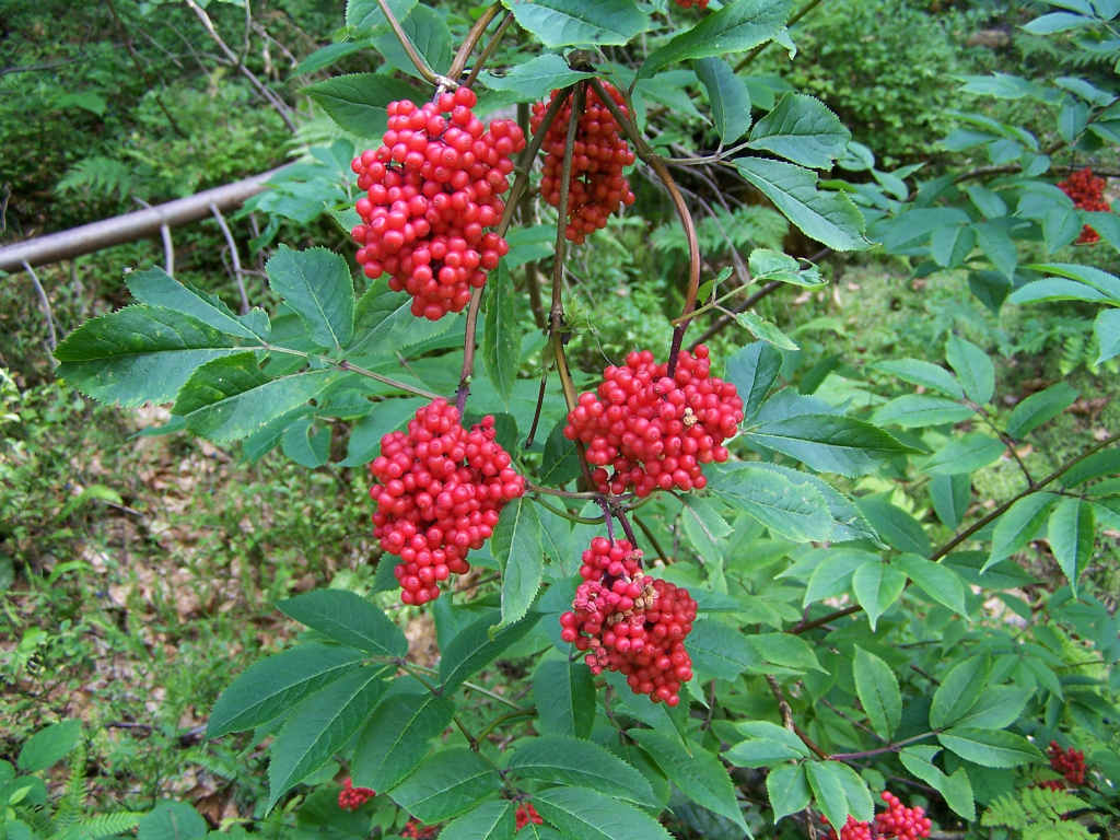 Sambucus racemosa (pl. bez koralowy)